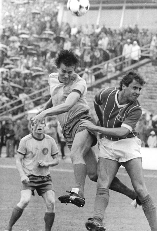 ADN-ZB-Settnik-31.5.86-zin- Berlin: 35. Endspiel um den FDGB-Fußball-Pokal 1. FC Lok Leipzig - 1. FC Union Berlin 5:1 (1:0)- Der dreifache Torschütze Hans Richter (Leipzig-l.) hat sich im Kopfballduell gegen den Berliner Dirk Koenen (r.) durchgesetzt. Hans Jörg Leitzke (Leipzig-Im Hintergrund) beobachtet die Aktion. Vor 50 000 Zuschauern im Stadion der Weltjugend errangen die Messestädter bei der neunten Finalteilnahme den vierten Pokaltriumph.